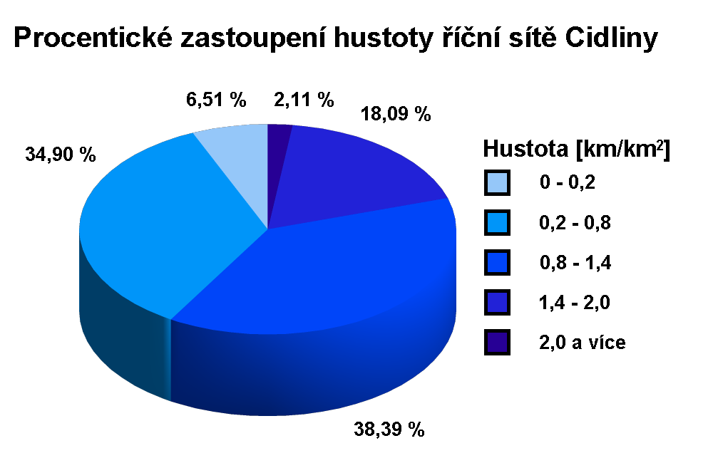 Procentické zastoupení hustoty říční sítě Cidliny